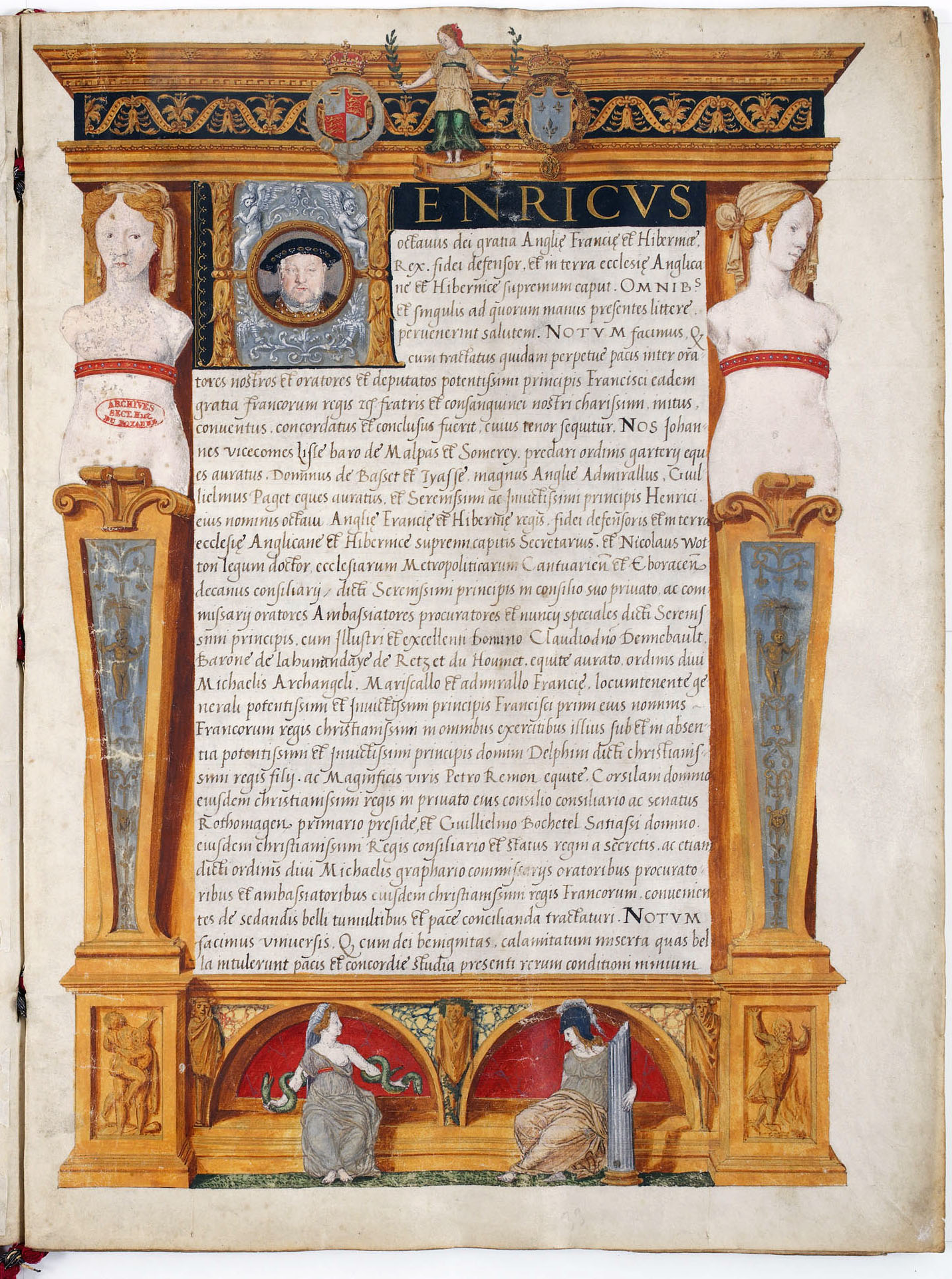 Ratification par Henri VIII, roi d'Angleterre, du traité d'Ardres conclu le 7 juin précédent avec François Ier